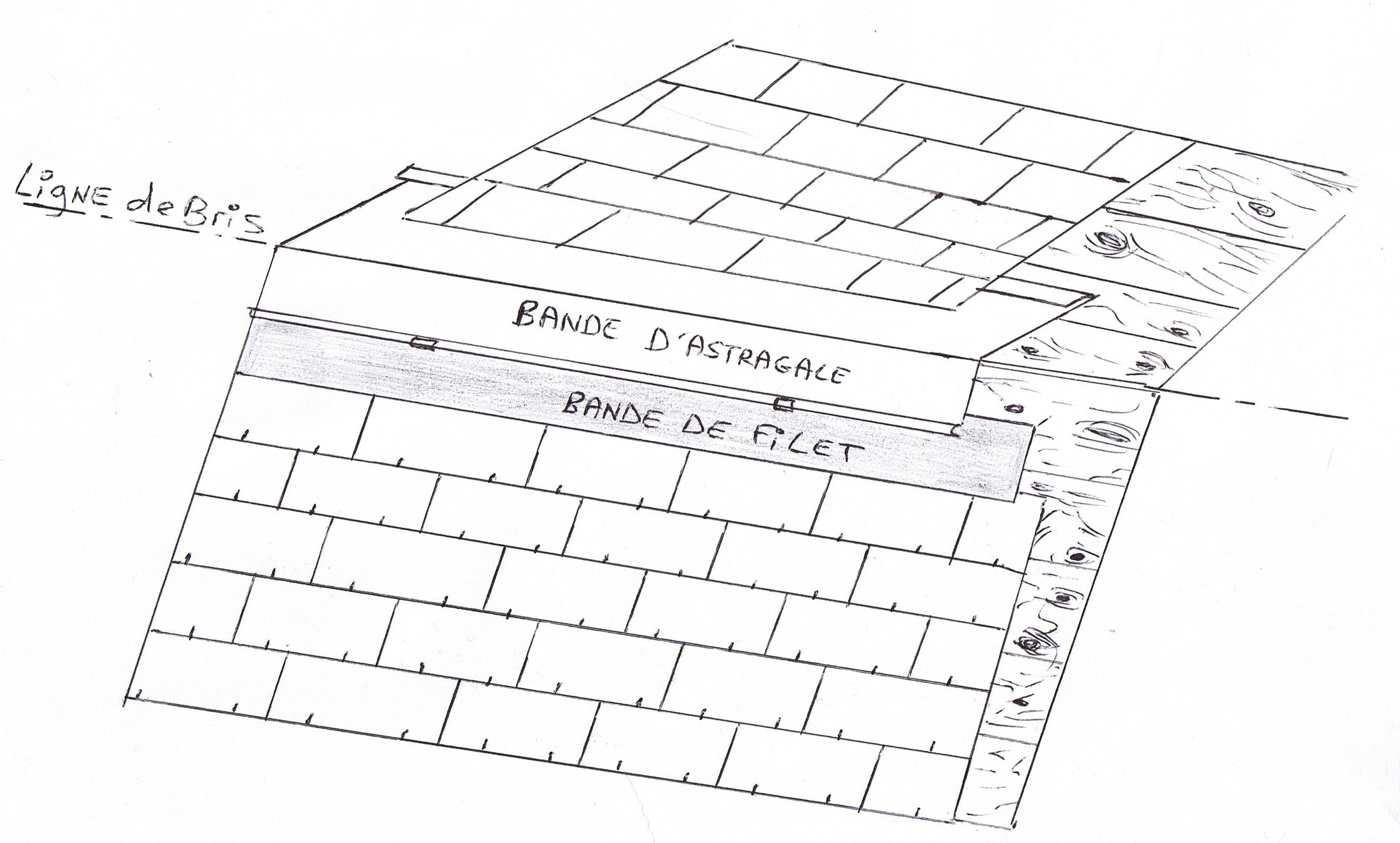 Schéma explicatif des différents constituant d'une couverture à l'endroit de la ligne de bris.